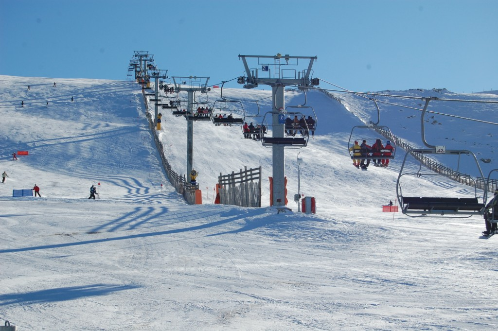 La Covatilla